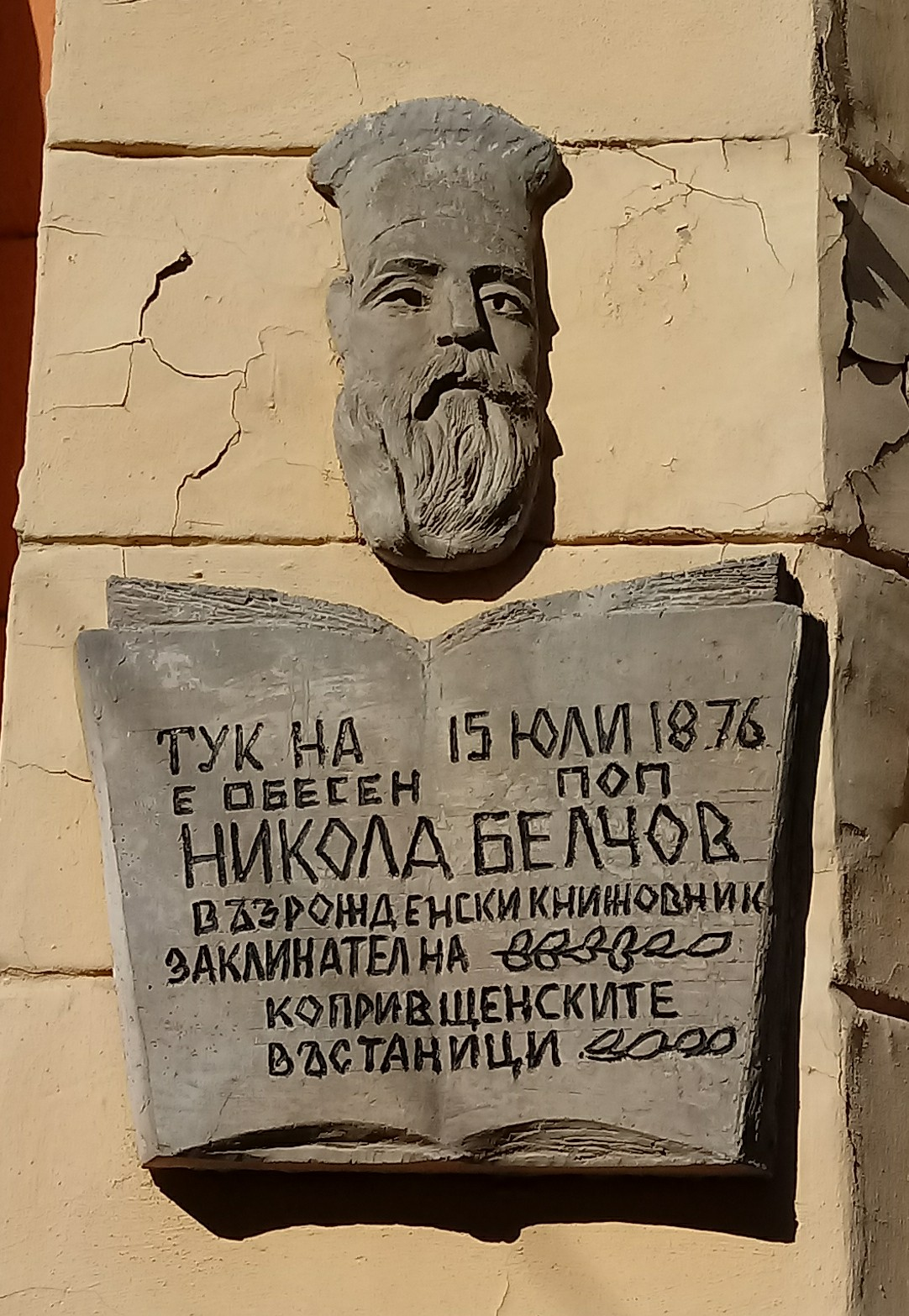 Pop Nikola Belchov memorial plaque, Plovdiv